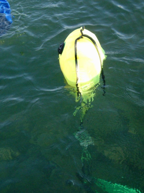 A 20 litre / 4.4 gallon lifting bag